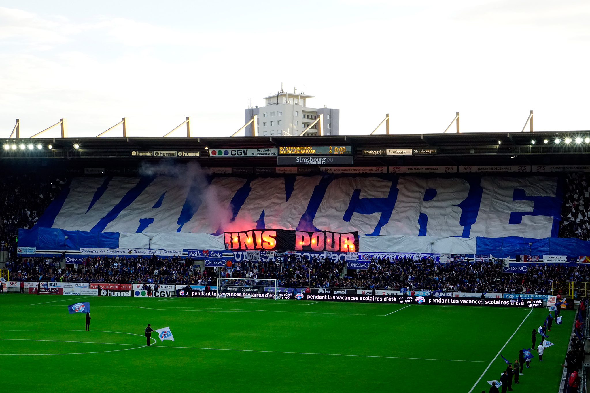 Tifo de la tribune Ouest (kop) du RC Strasbourg Alsace face à Bourg en Bresse, en Ligue 2, pour le match de la montée en Ligue 1, qui symbolise le slogan des Ultra Boys çà "Unis pour vaincre"